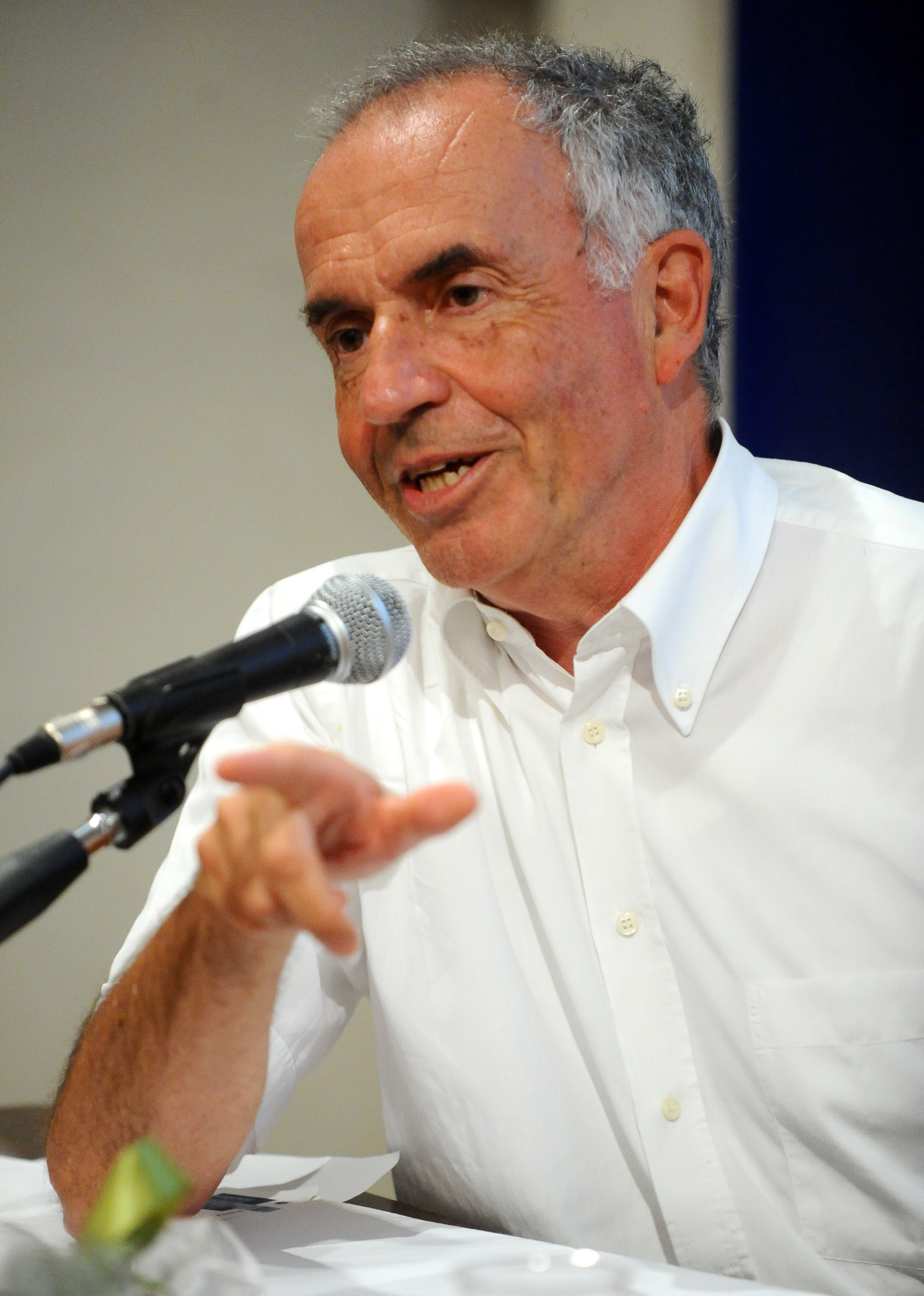 Massimo Bacigalupo a Mantova per il Festivaletteratura 2012.